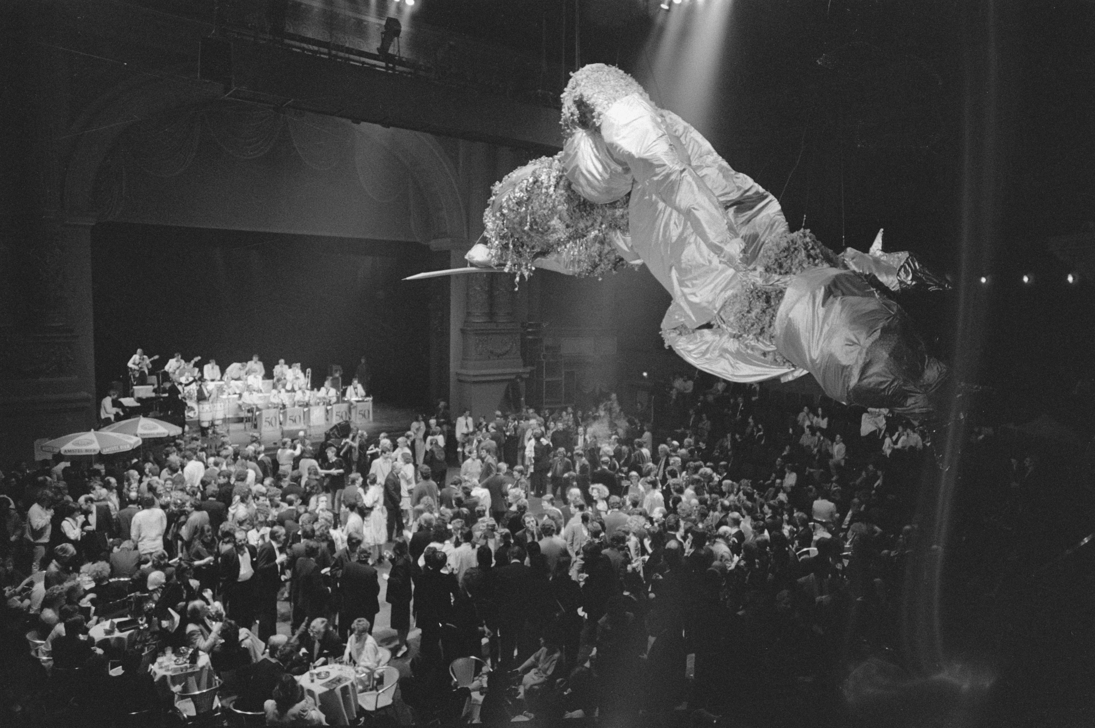 Boekenbal Amsterdam (Nederland), 20 maart 1985